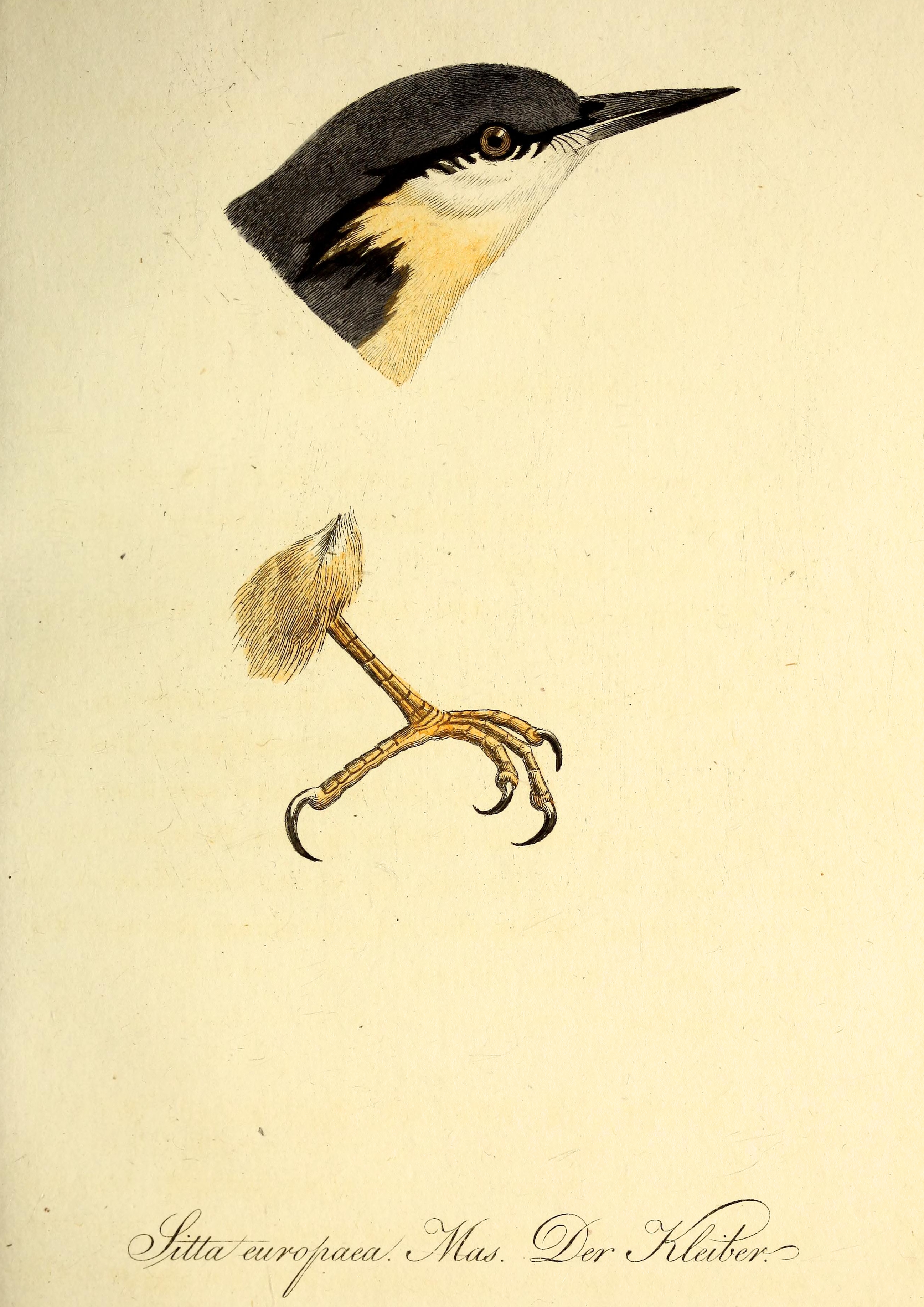 Sitta caesia in its original description